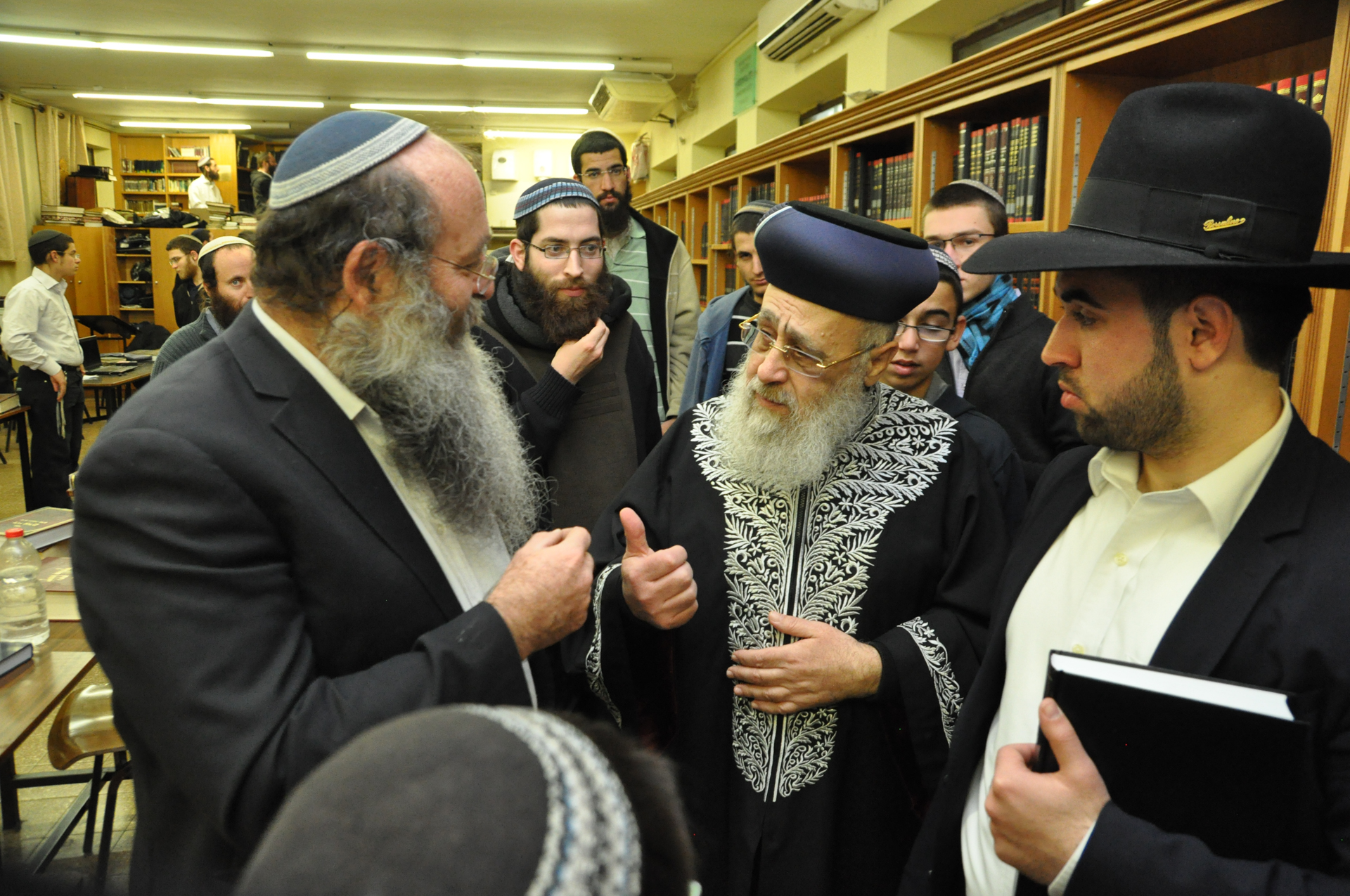 הרב בורשטין והרב יצחק יוסף